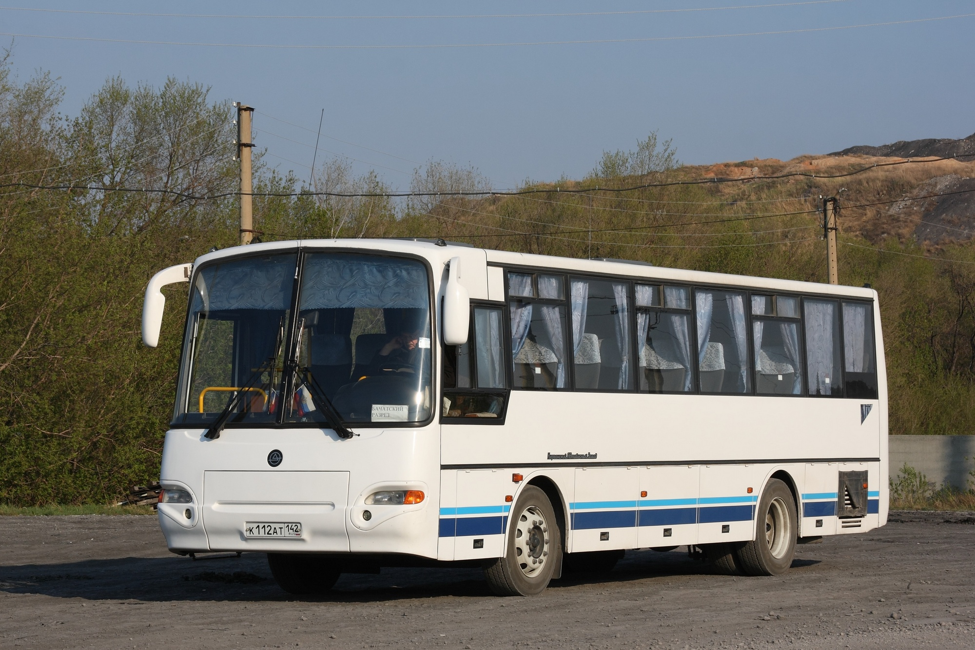 Автобус КАвЗ-4238 в посёлке Бачатском, Кемеровская область.